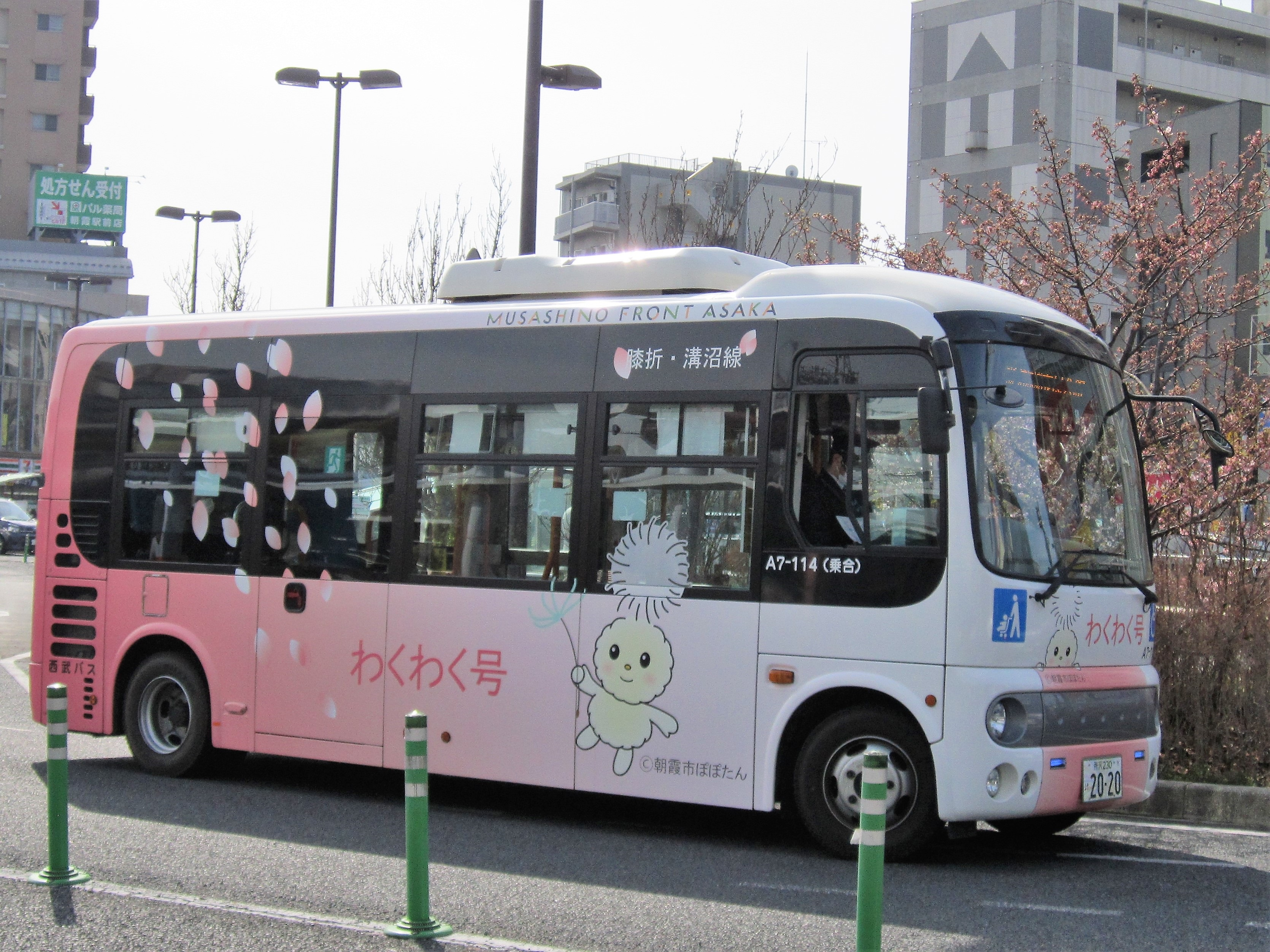 朝霞市内循環バス「わくわく号」（西武バスA7-114） Canon PowerShot A2200